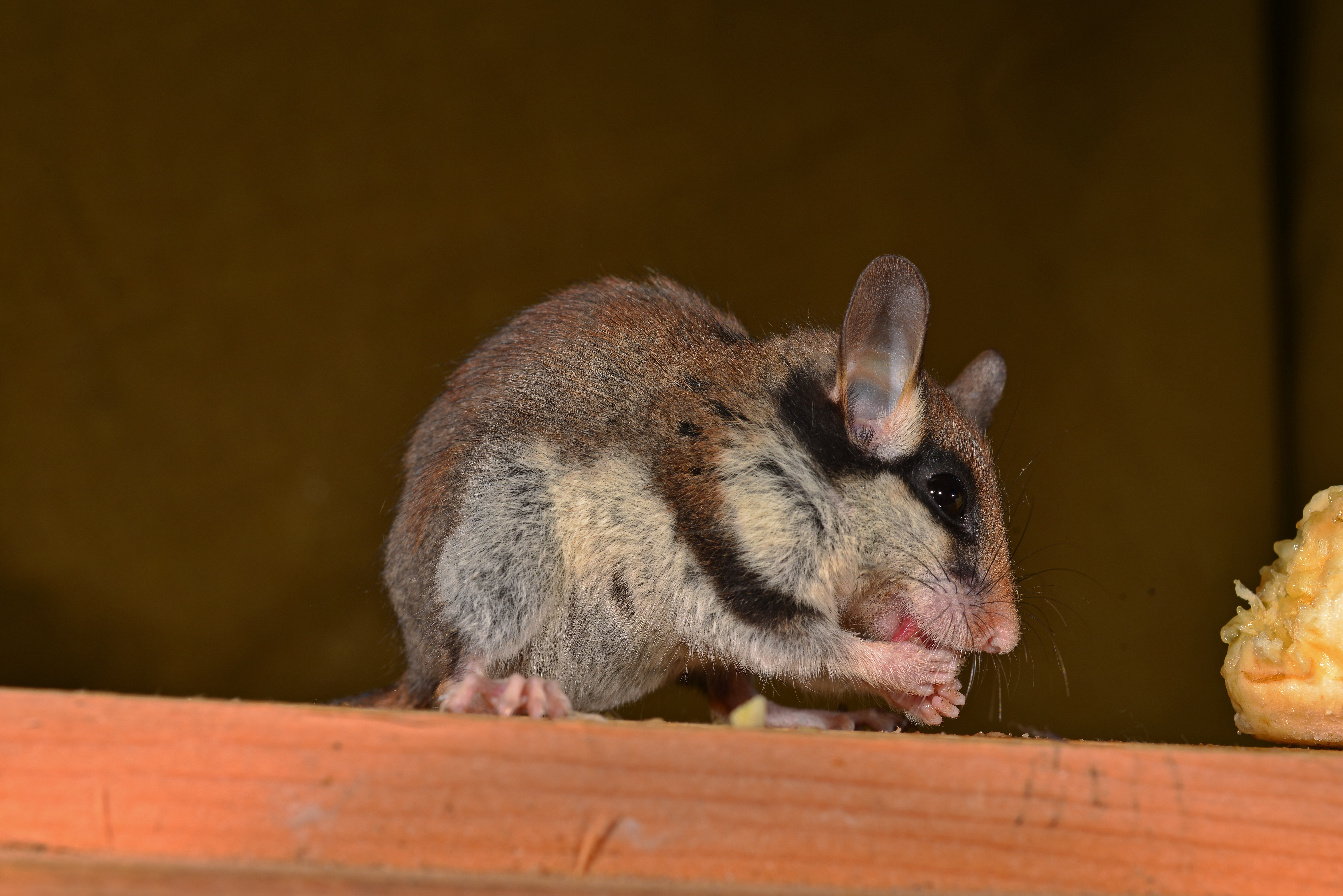 Gartenschläfer beim Reinigen der Pfoten.